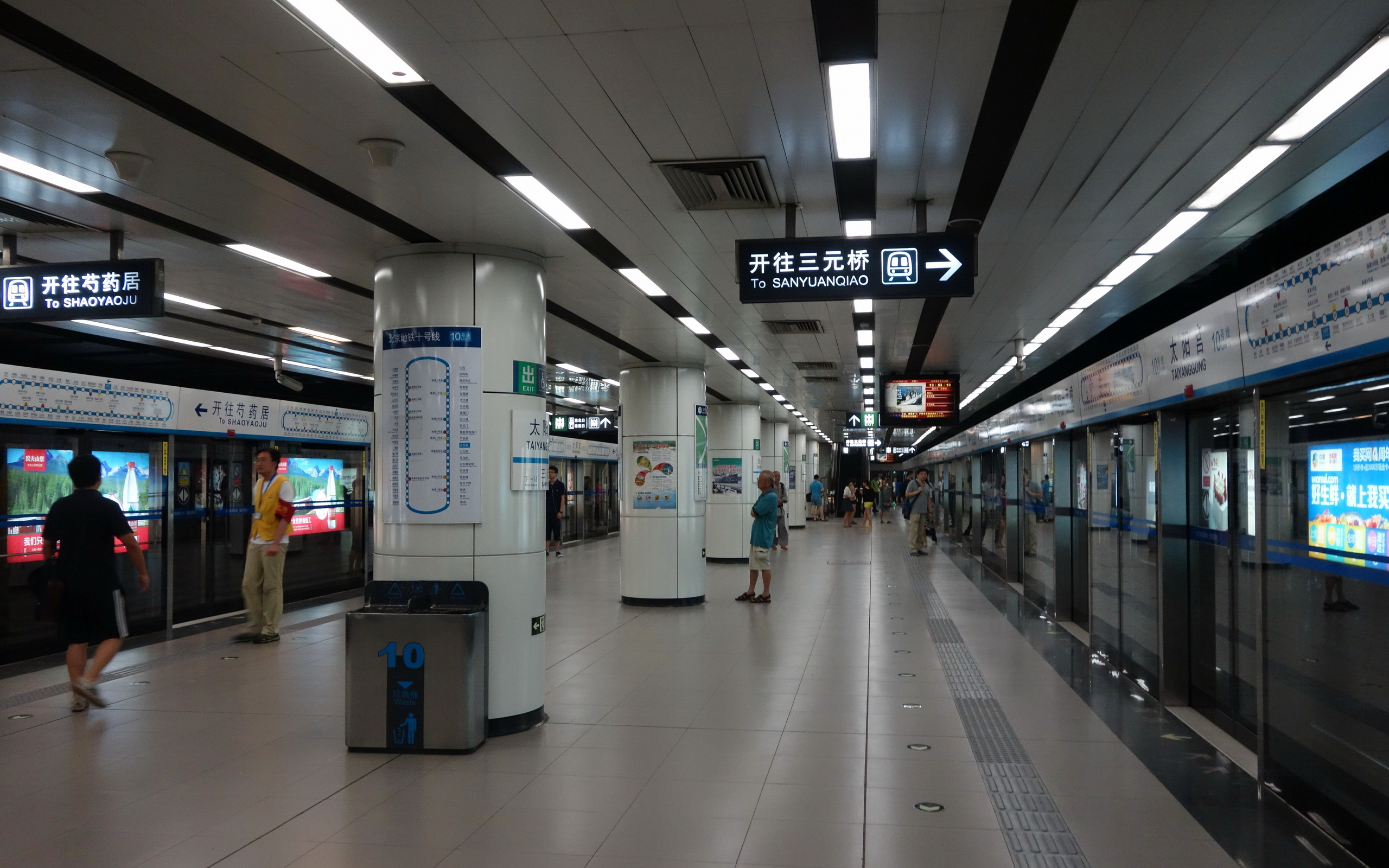 北京地铁10号线太阳宫站站台层